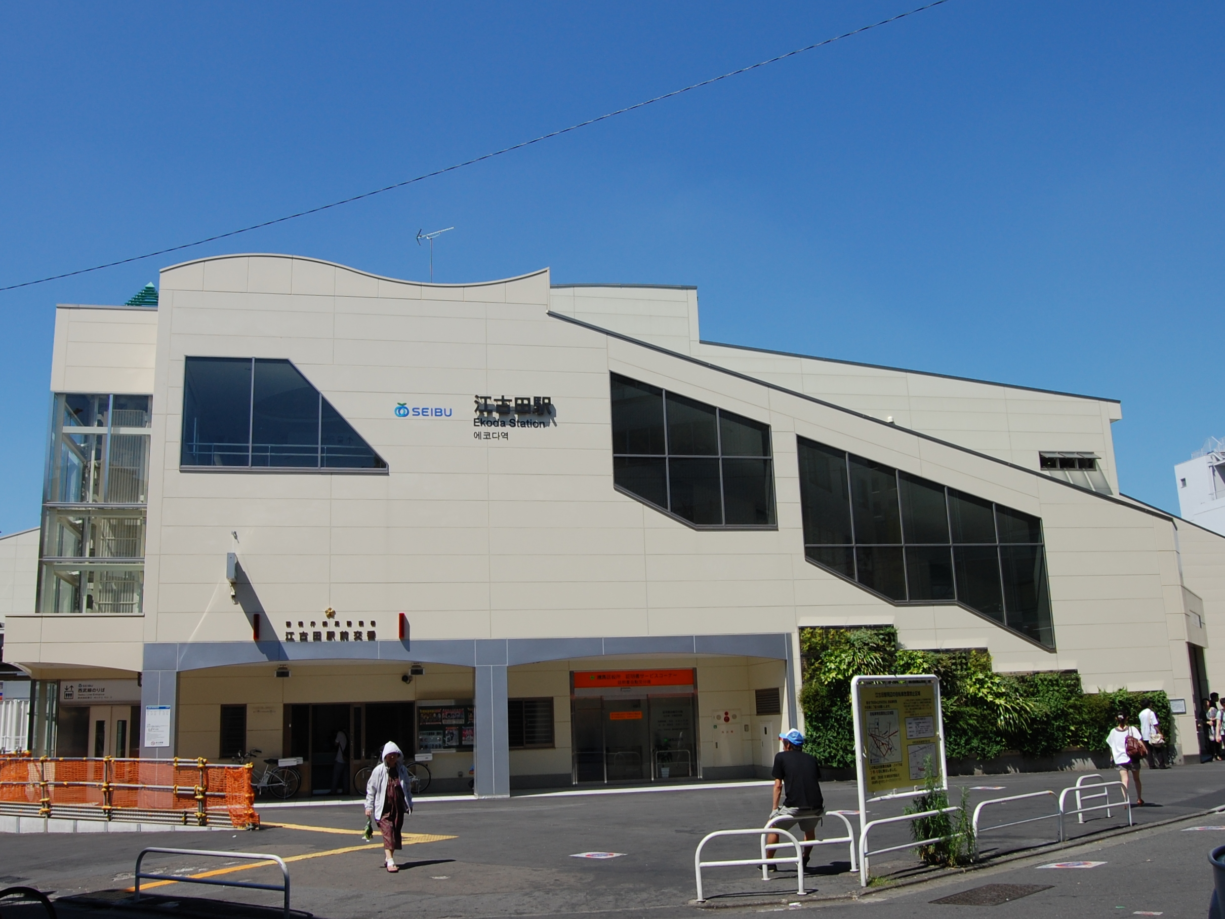 西武池袋線 江古田駅 駅舎南口 （2011年7月16日撮影）